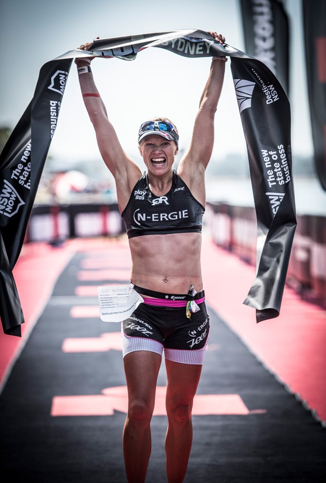 Anja Beranek gewinnt den Ironman 70.3 Sydney